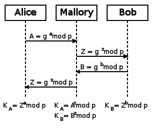 Sulmi man-in-the-middle